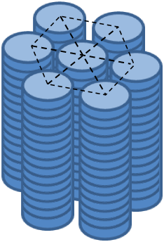 Esquema del ordenamiento que se presenta en la fase columnar hexagonal.